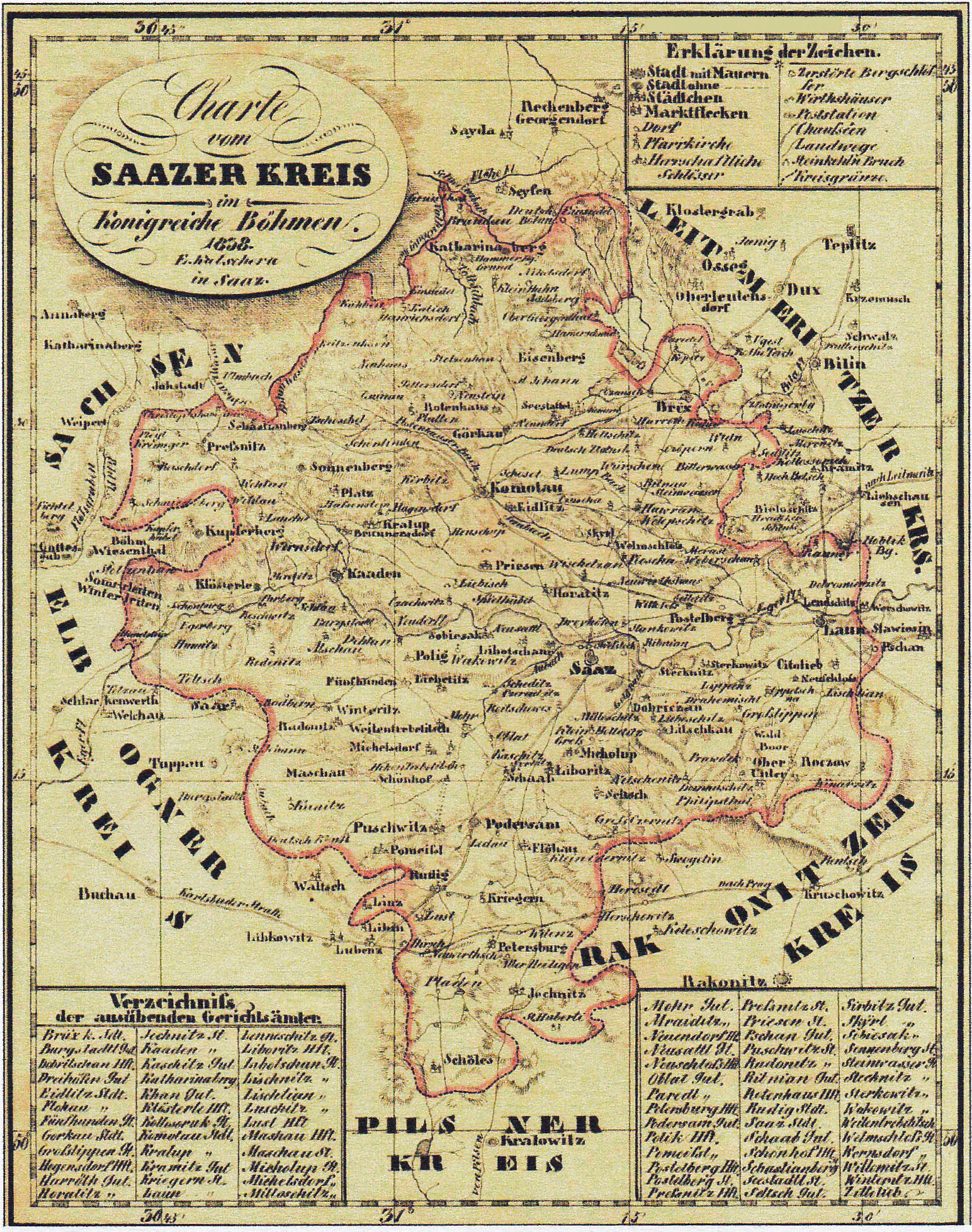 Karte des Saazer Kreises von 1838, noch mit der alten Gradangabe 31° östl. Länge von Ferro